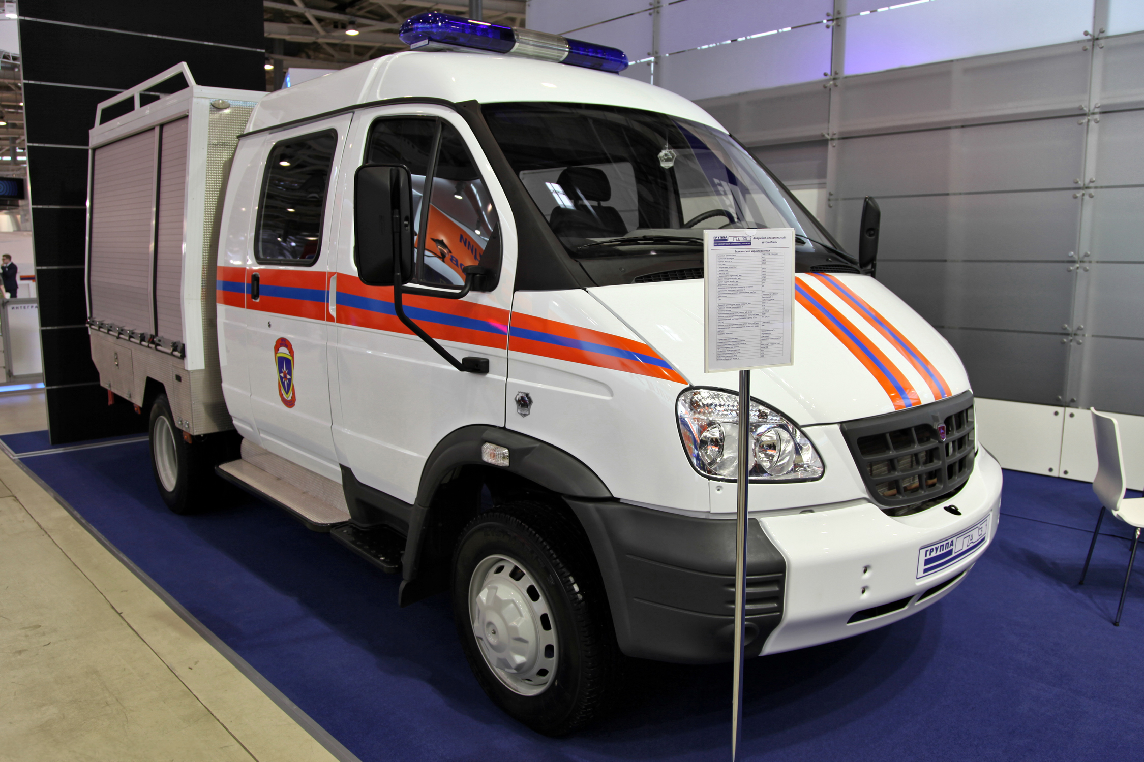 Аварийно-спасательный автомобиль на базе ГАЗ-33106 (Emergency vehicle on GAZ-33106 base)